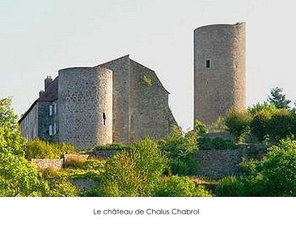 Chateau de Chalus Chabrol